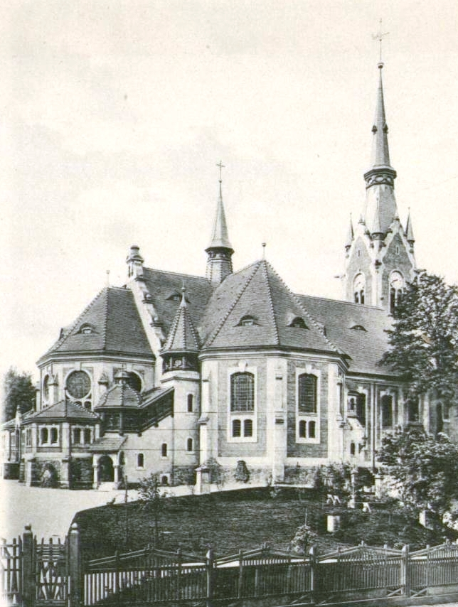 Auferstehungskirche Dresden-Plauen: Aufnahme nach Abschluss des Neubaus 1903